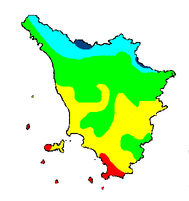 Carta dei giorni di pioggia (≥ 1 mm) medi annui in Toscana (1961-1990) 120 giorni